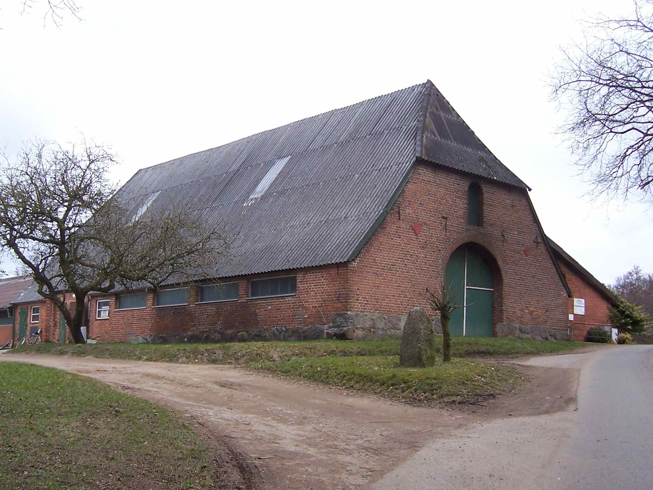 Teil des Gutshofes in Schnaap